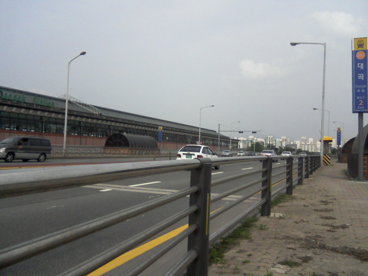 首都圏電鉄3号線大谷駅